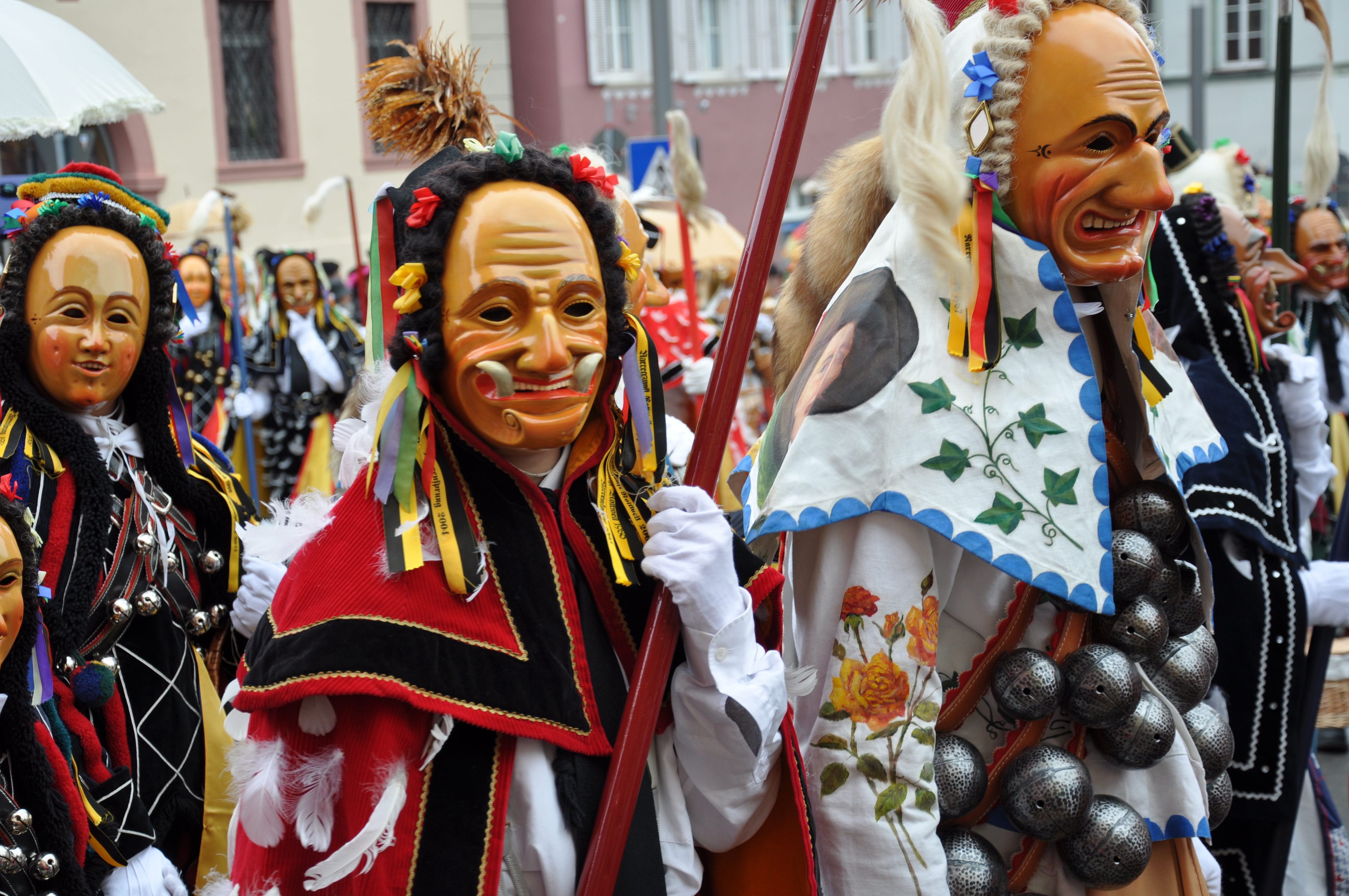 Rottweil, Narrensprung am Fasnetsmontag 2012 ganz links Fransenkleidle, Bildmitte: Federahannes, rechts: Biss